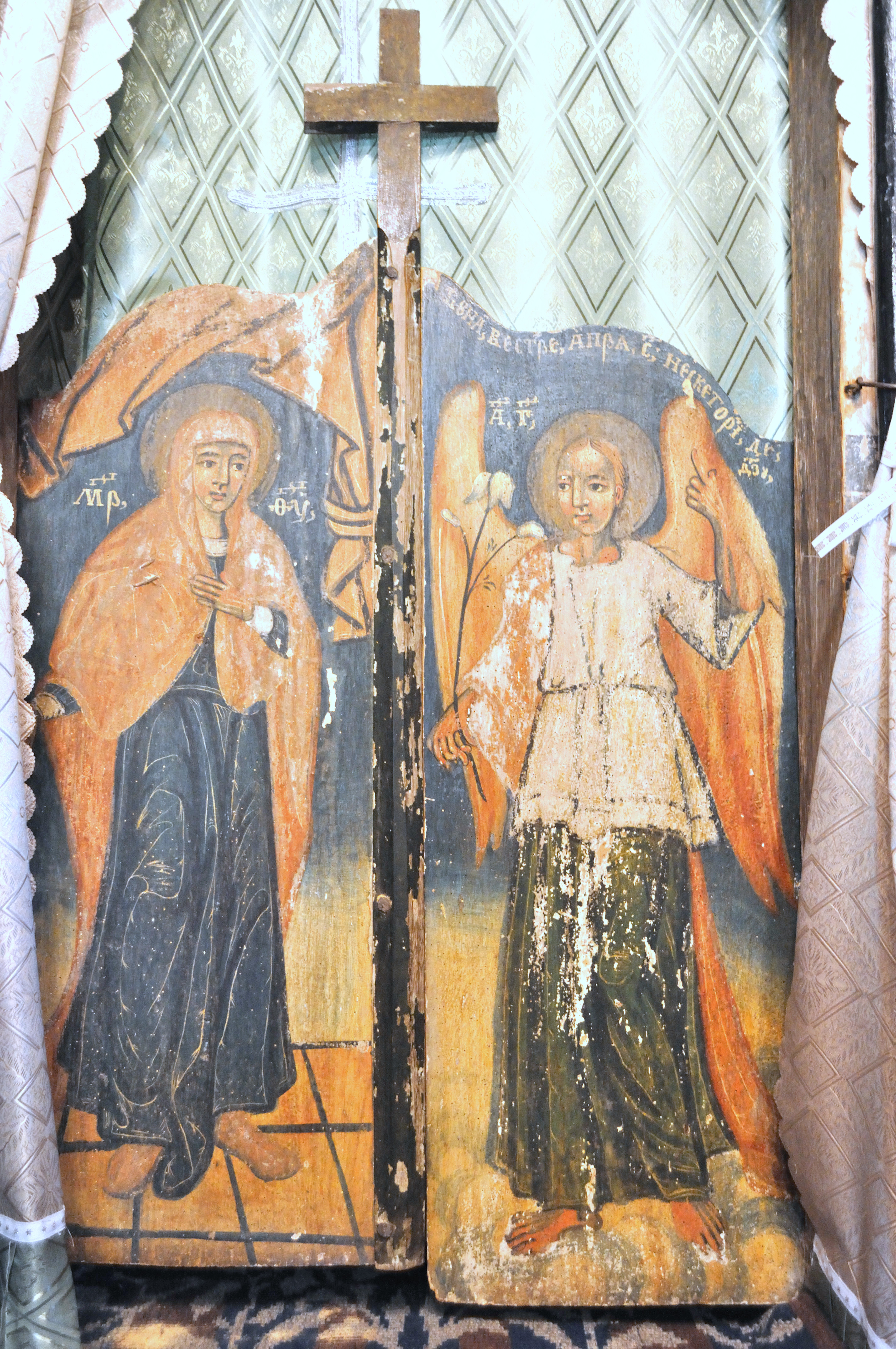 Biserica de lemn „Adormirea Maicii Domnului” din Lăpugiu de Jos, județul Hunedoara